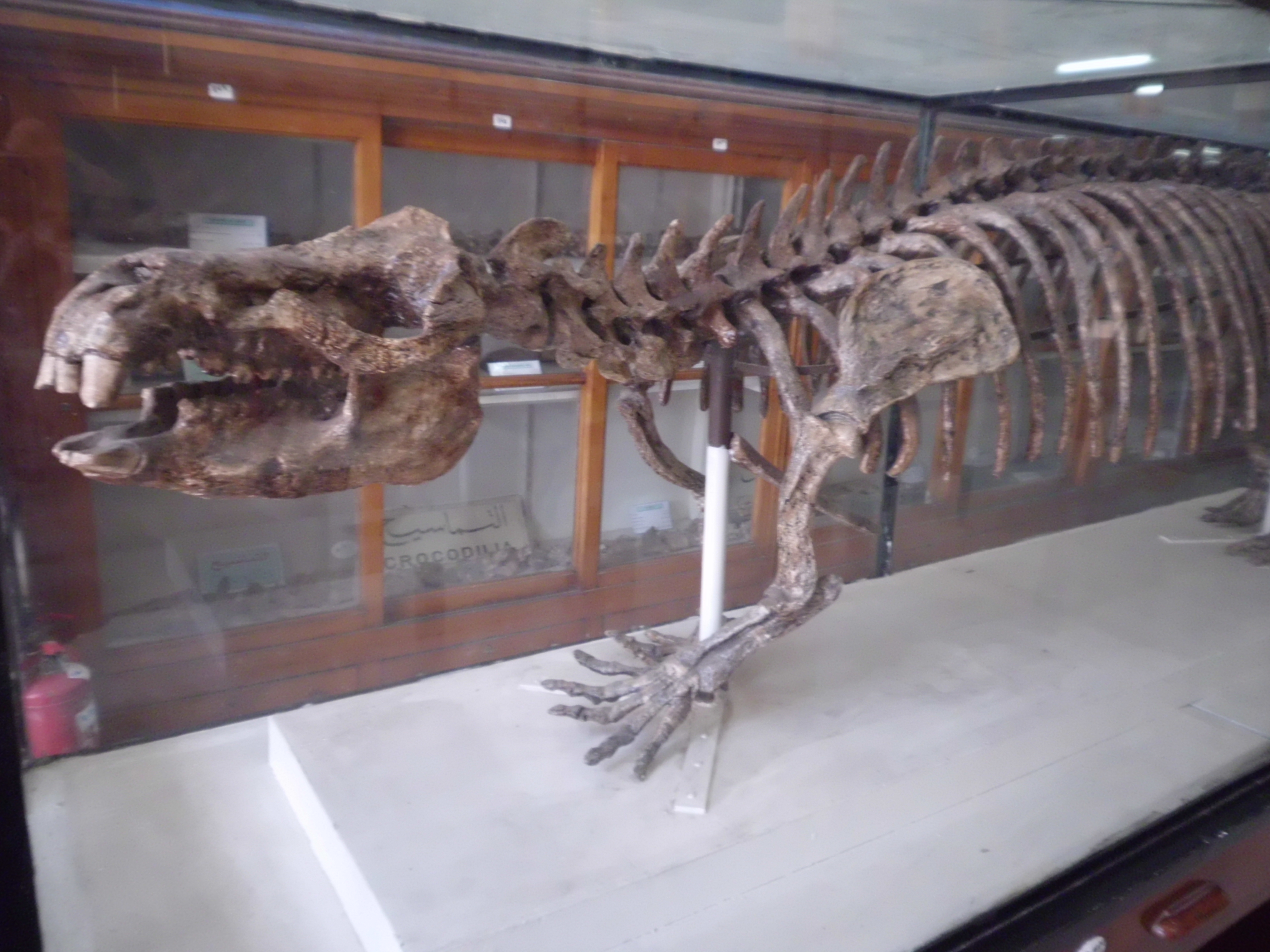 موريثيريوم هو احد الثدييات المنقرضة وقد وجدت حفرياته بمنطقة قصر الصاغة التابعة لعصرالايوسين بمنطقة الفيوم ويمتاز بارتفاع صغير من 50 الى 70 سم وجسم طويل واطراف قصيرة ودقيقة وحيوان الموريثيريوم يعتبر من اسلاف الفيلة وابقار البحر وكان اكل للعشب ويعيش بالقرب من مصبات الانهار ويقضي جزء كبير من حياته في الماء